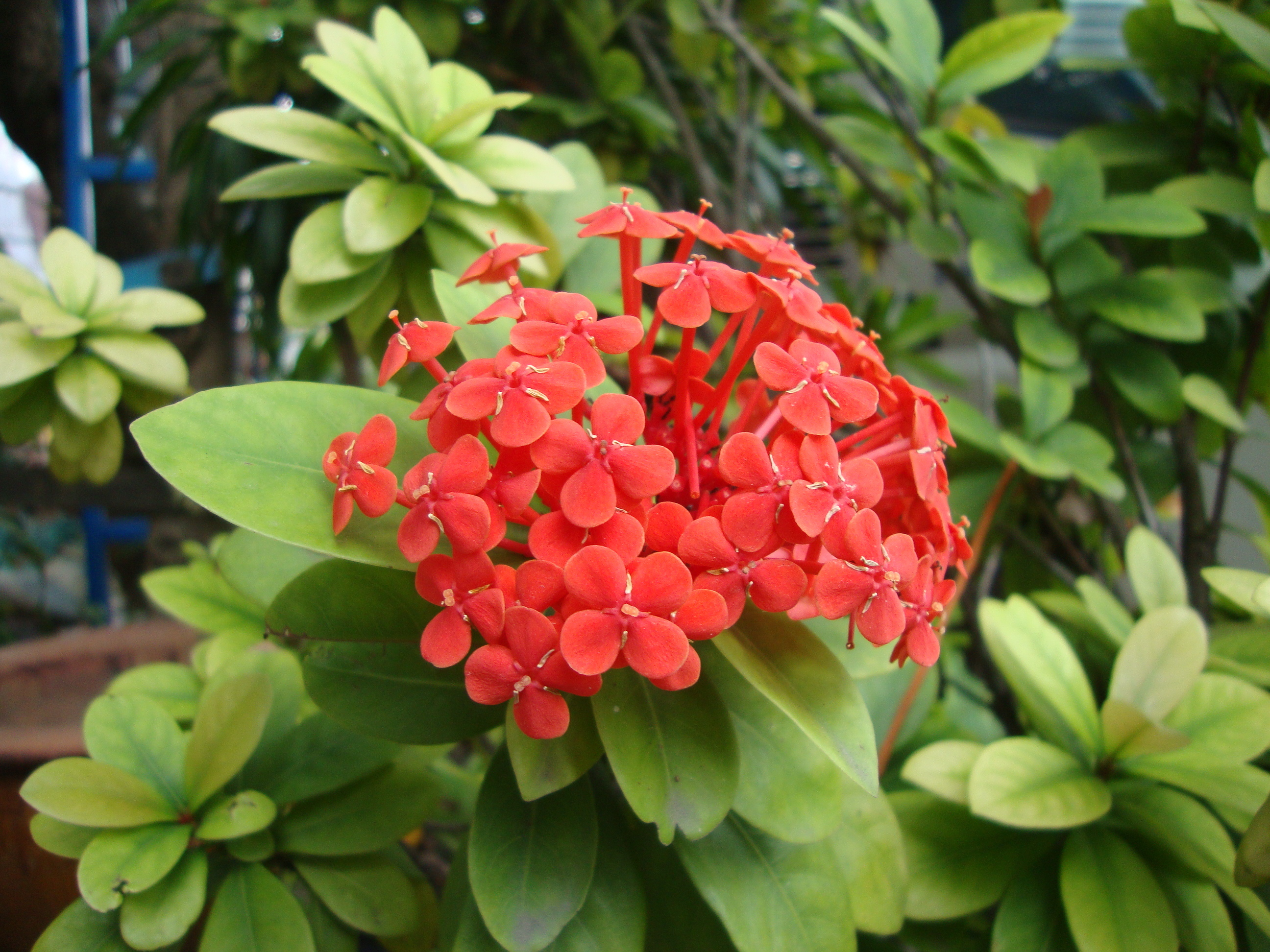 Ixora chinensis Lam., 1789Tiếng Việt: Trang tàu